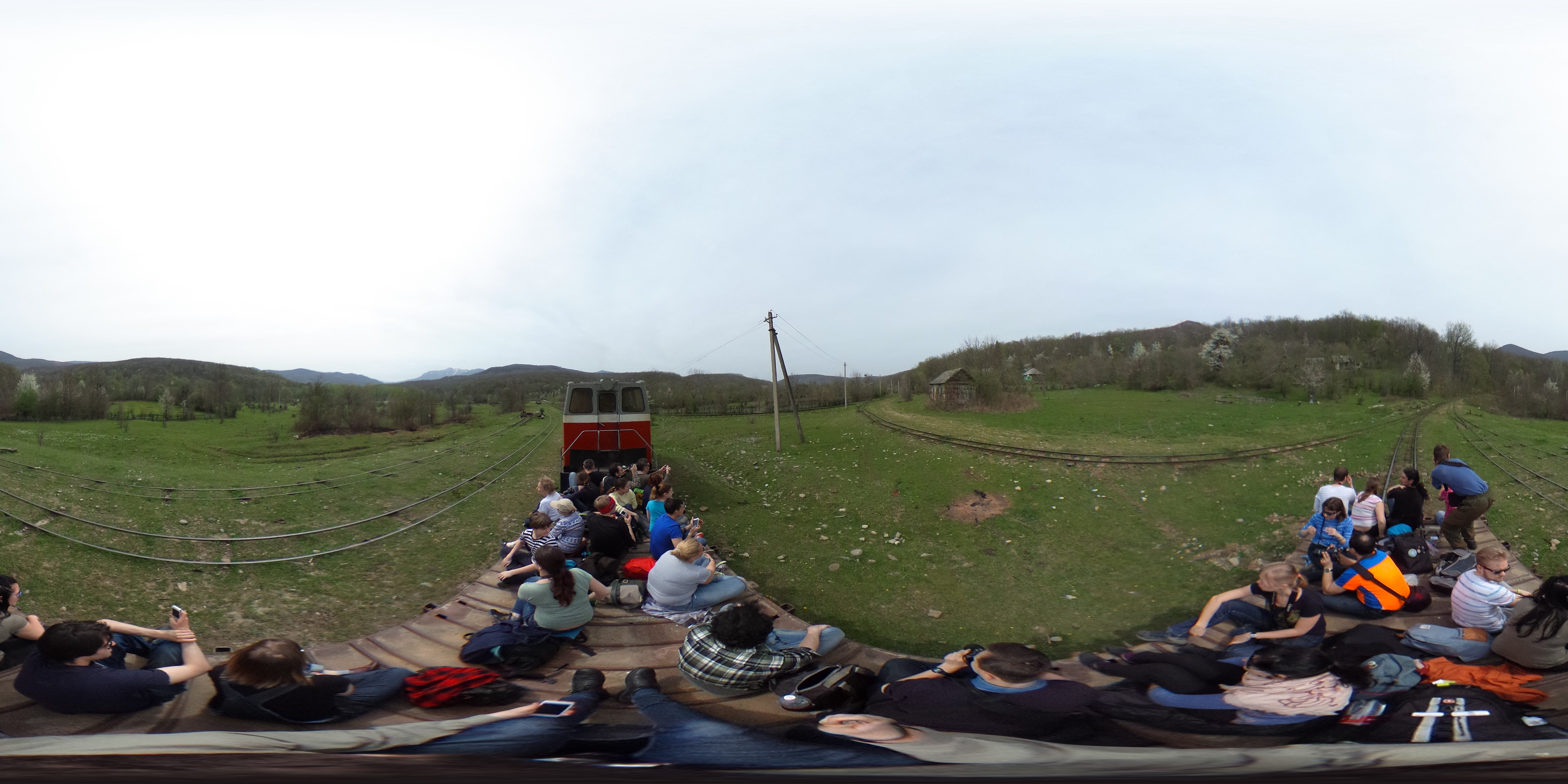 Треугольная станция 40 километр.